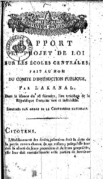 Joseph Lakanal (1762-1845)-Rapport et projet de loi sur les écoles centrale